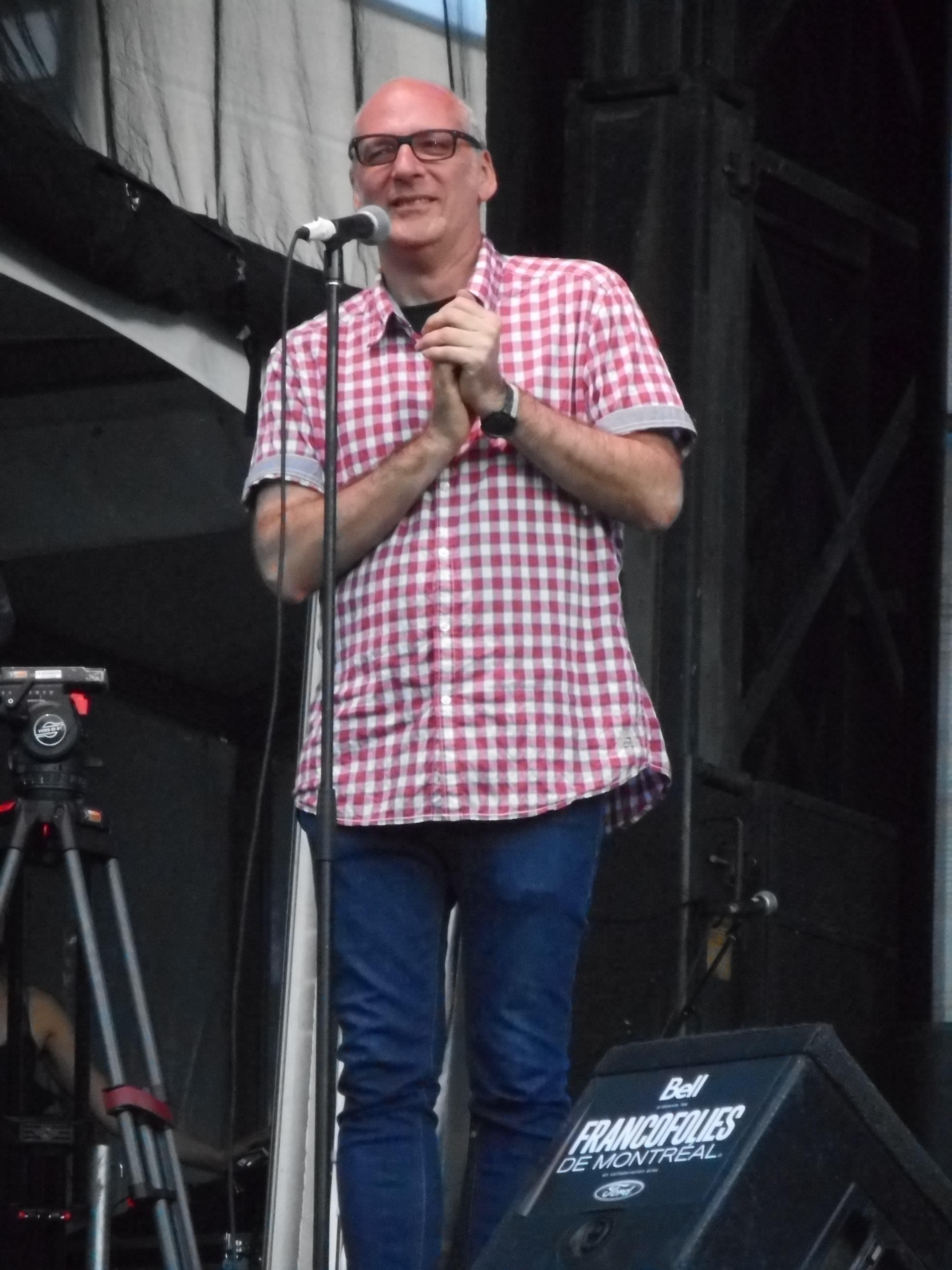 Le duo Alfa Rococo a offert une performance le 11 juin 2015 sur la rue Sainte-Catherine, dans le cadre du Spectacle d'ouverture des FrancoFolies de Montréal 2015.